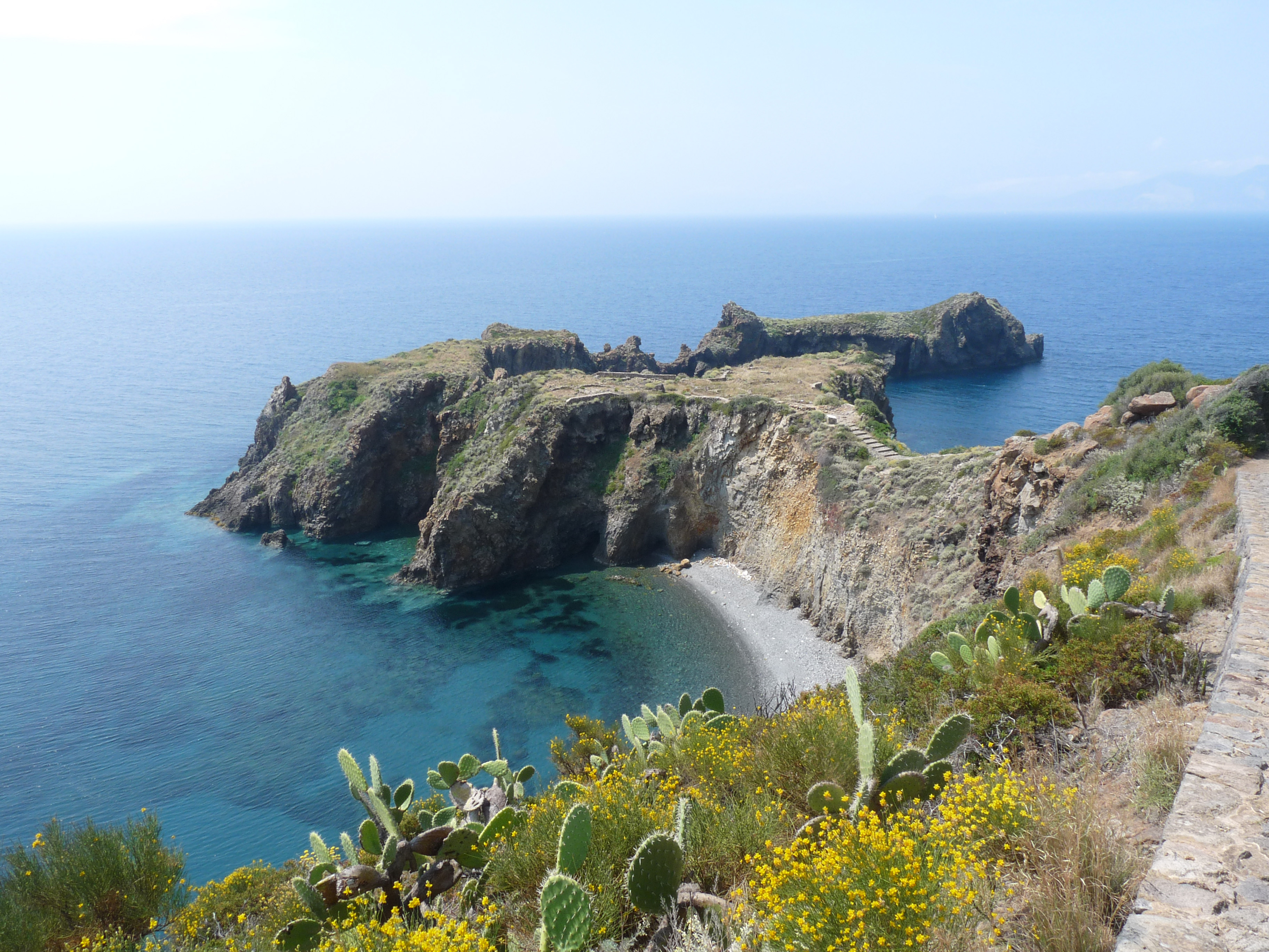 Vestiges d'un village préhistorique sur la Punta Milazzese à Panarea (îles Eoliennes, Sicile)